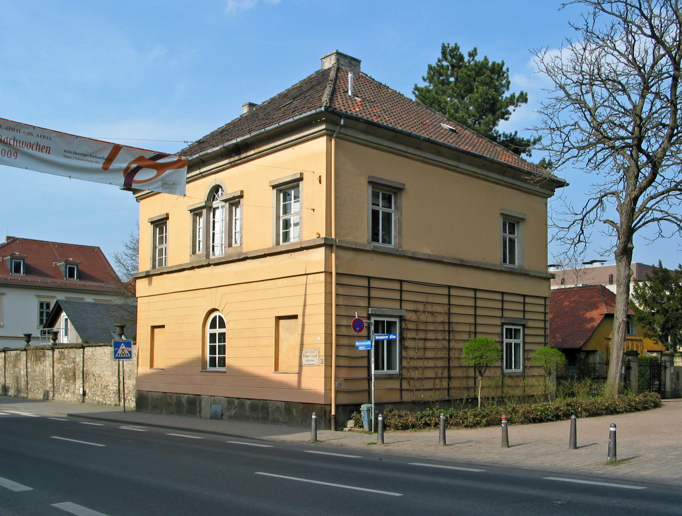 Das ehemalige Wohnhaus von Franz Liszt in Weimar (Südwestansicht).